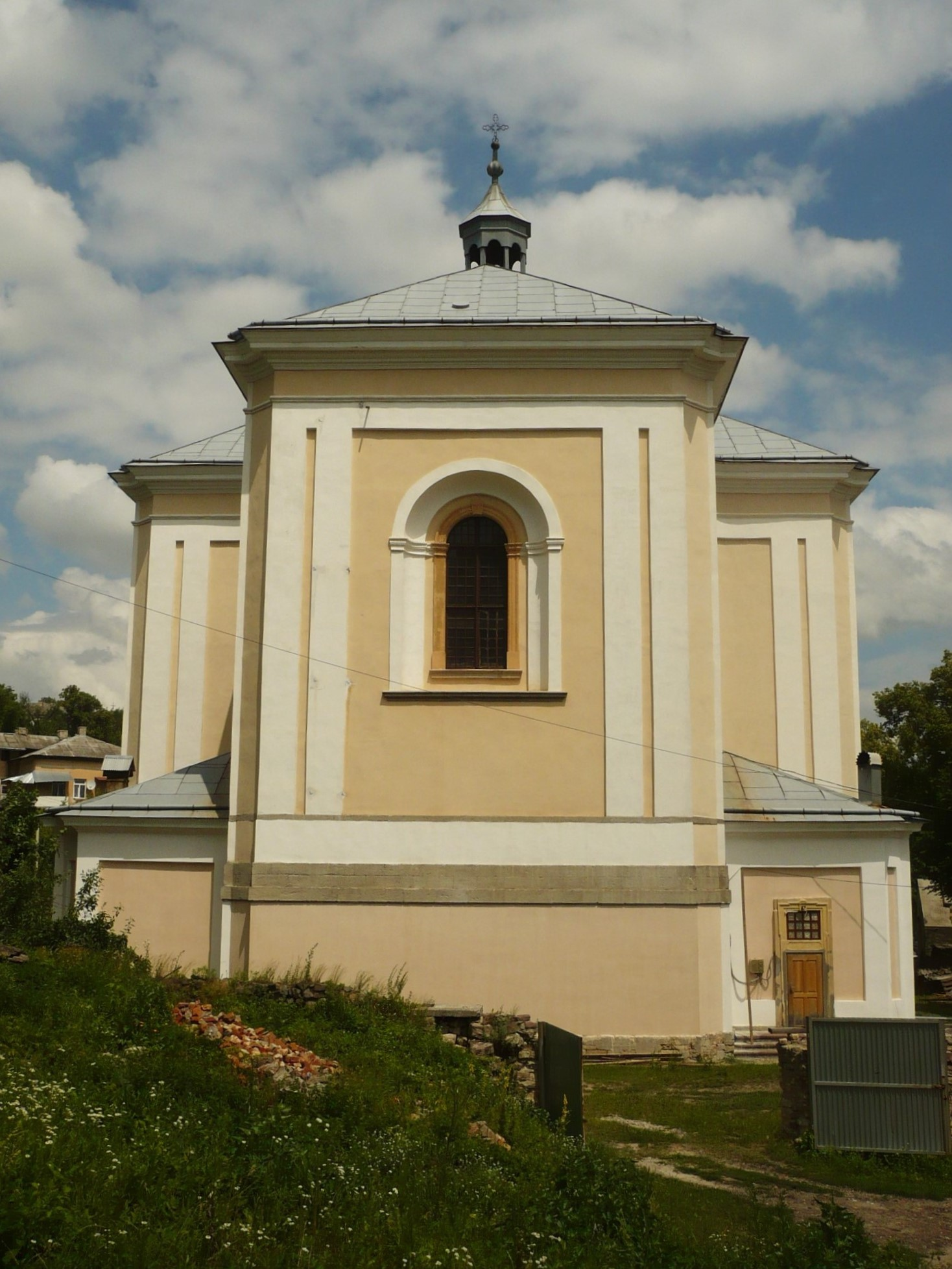 Buczacz. Kościół Wniebowzięcia NMP